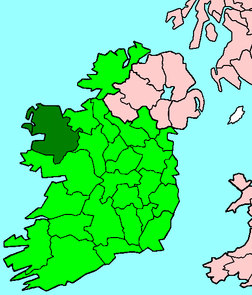 Mayo